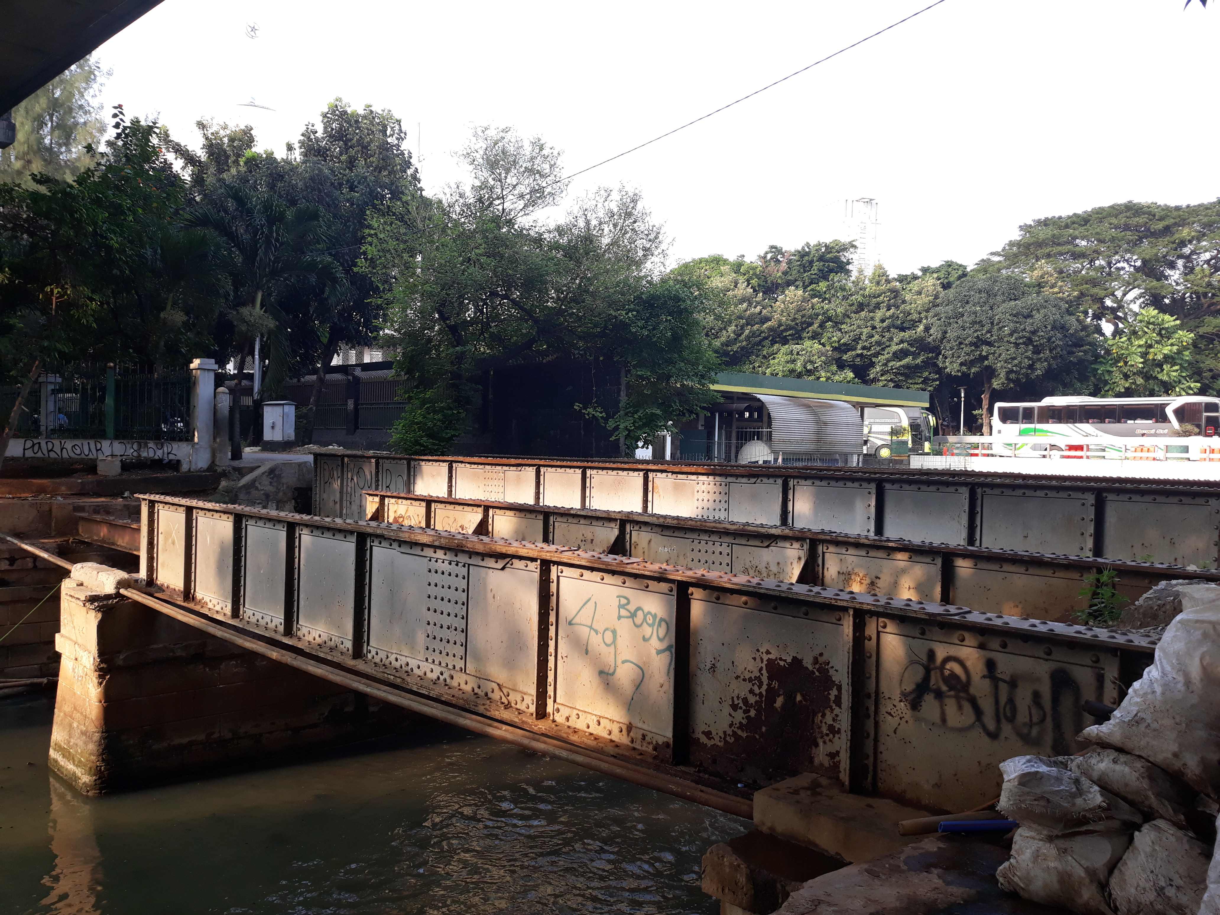 Sisa jembatan kereta api peninggalan Nederlands-Indische Spoorweg Maatschappij (NIS) yang terletak di sebelah Masjid Istiqlal.